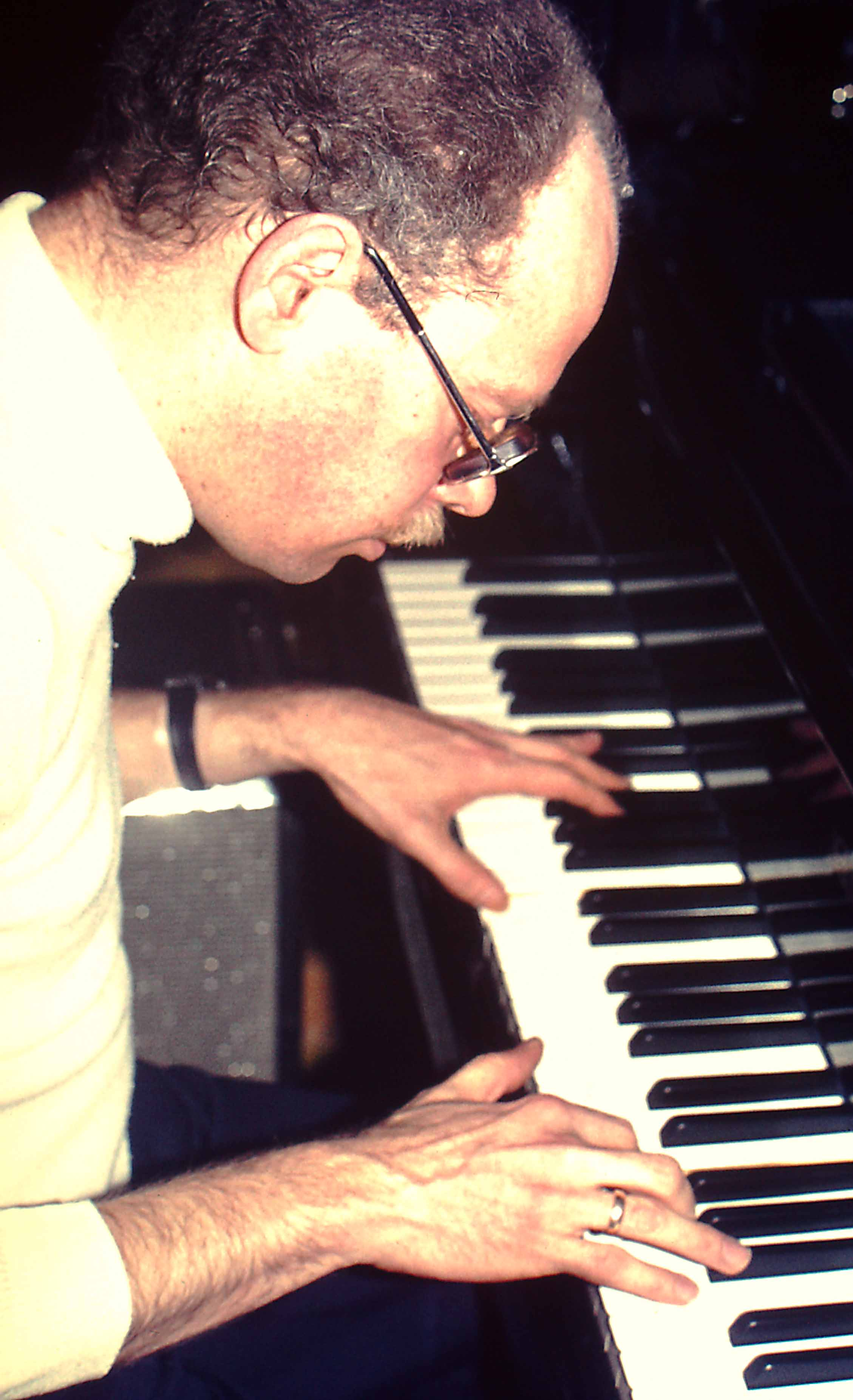 Hans-Jürgen Bock alias Ragtime Specht, Göppingen, 1975